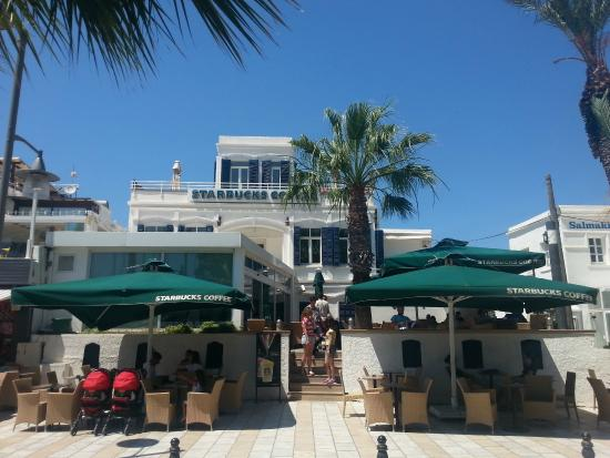 Bodrum Starbucks mağazası